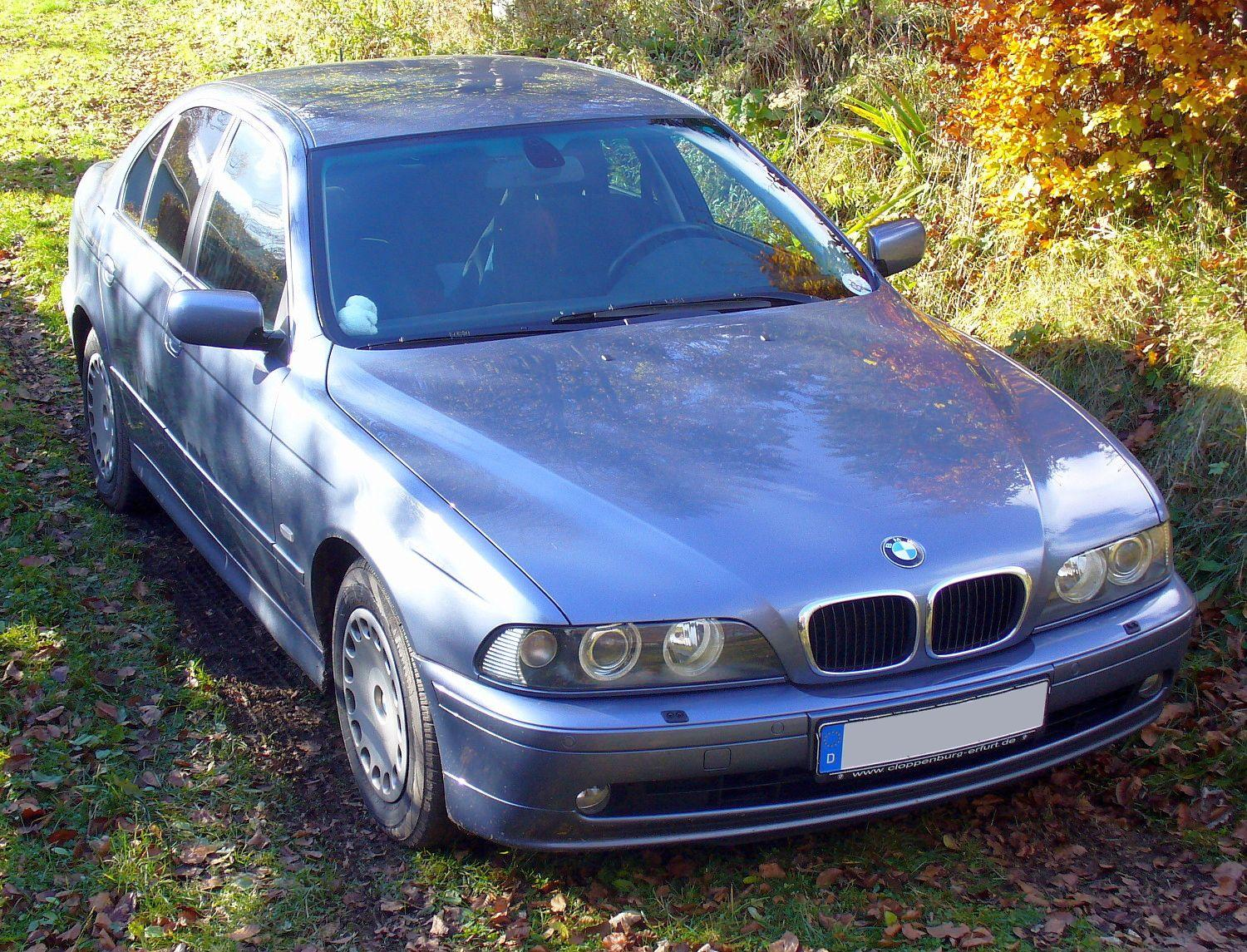 BMW E39